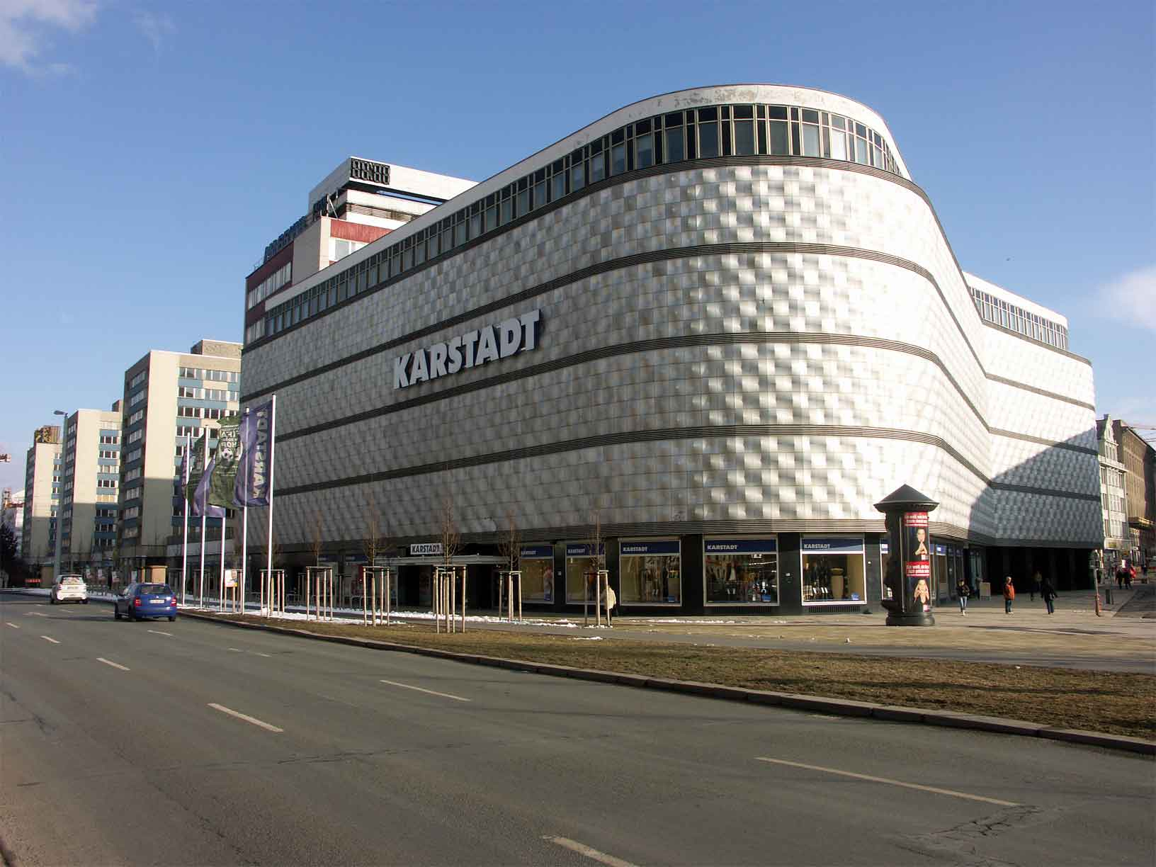 Ehemaliges Konsument Warenhaus Leipzig "Blechbüchse", ursprünglich 1908 erbaut, nach Kriegsschäden 1964-1966 mit Anbau und neuer fensterloser Fassade neu errichtet (Konzeption: Metallgestalter Harry Müller); auf dem Grundstück stand das Geburtshaus Richard Wagners, nach 1990 Galeria Horten, dann Kaufhof, Karstadt Warenhaus Zwischennutzung bis 9/2006; eine vollständige Neugestaltung des City-Areals mit einem großen Einkaufszentrum ist geplant, Tröndlinring/ Brühl, Leipzig